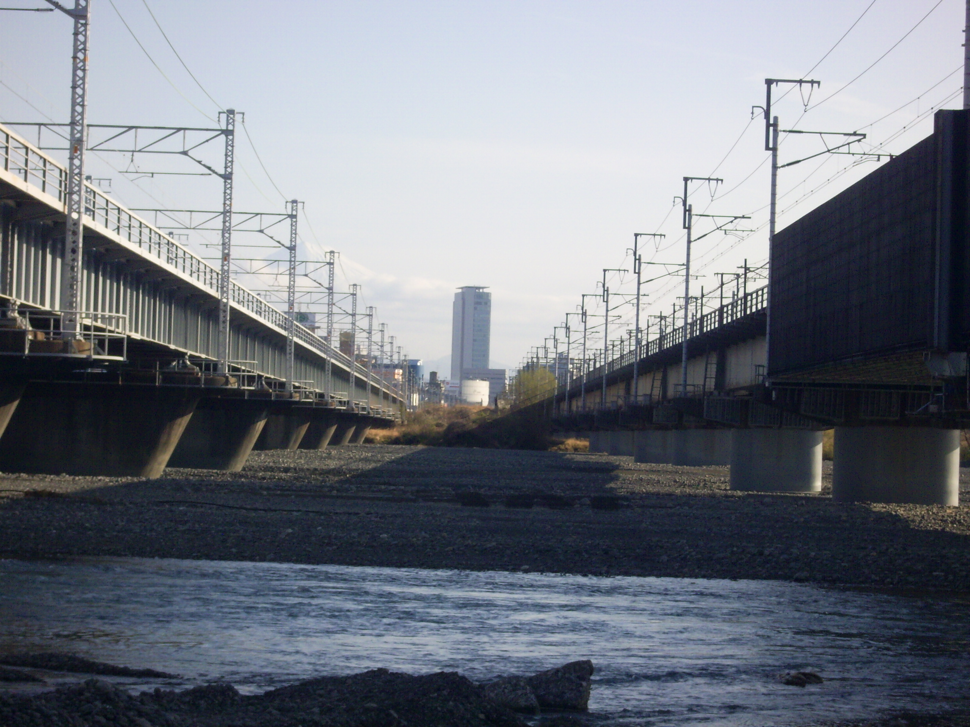 安倍川に架かる東海道線（左）と東海道新幹線（右）の橋梁を静岡市駿河区側から望む。遠くに静岡駅前（葵区）の葵タワーが見える。 ㊟カメラを起動すると日付機能が出荷時のものに初期化されるため、ファイル履歴の投稿日時とメタデータの原画像データの生成日時が異なります（本概要欄の下記日付が撮影日）